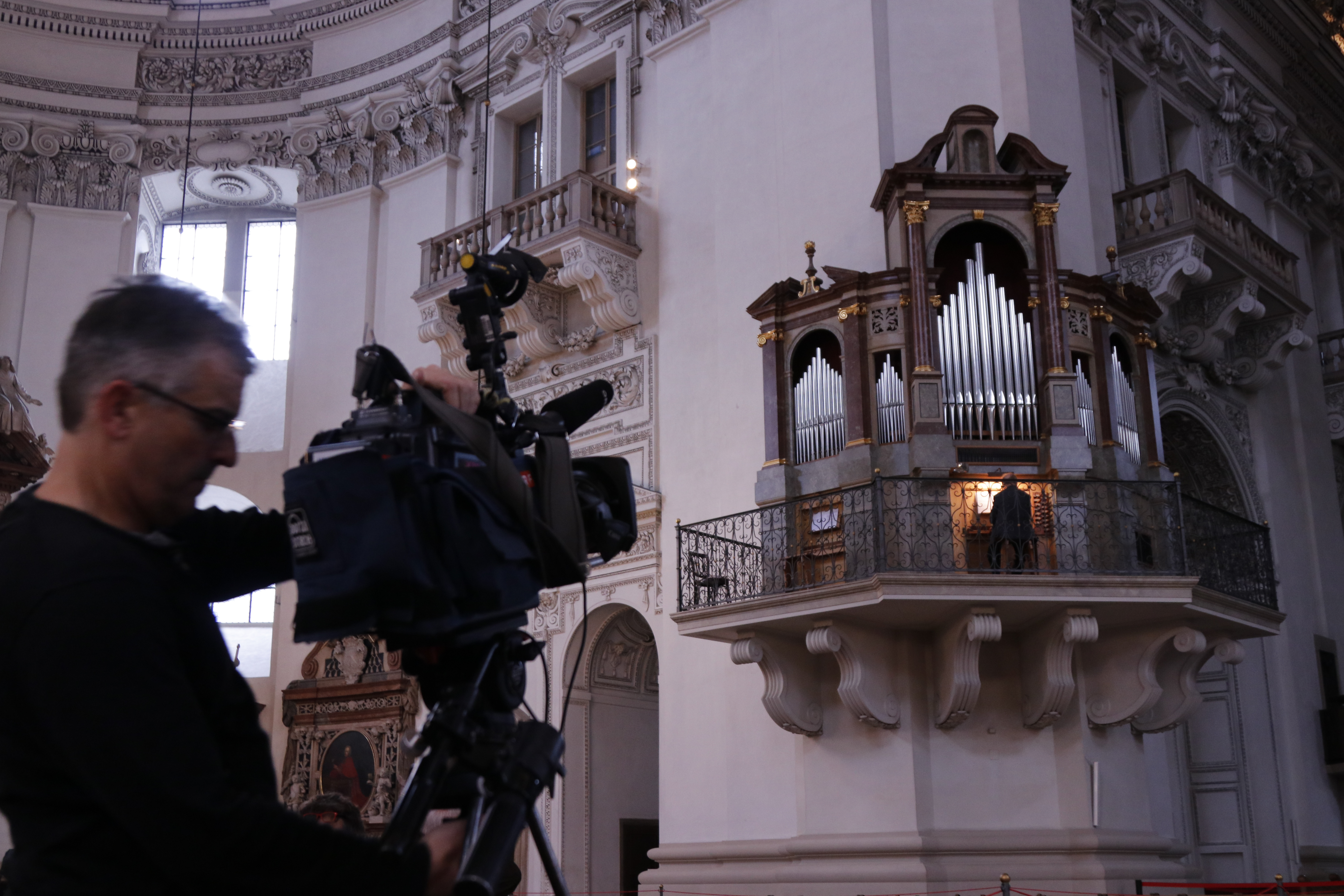 Ein Kameramann des ORF macht Aufnahmen im Salzburger Doms für einen Beitrag über das WikiAlpenforum.